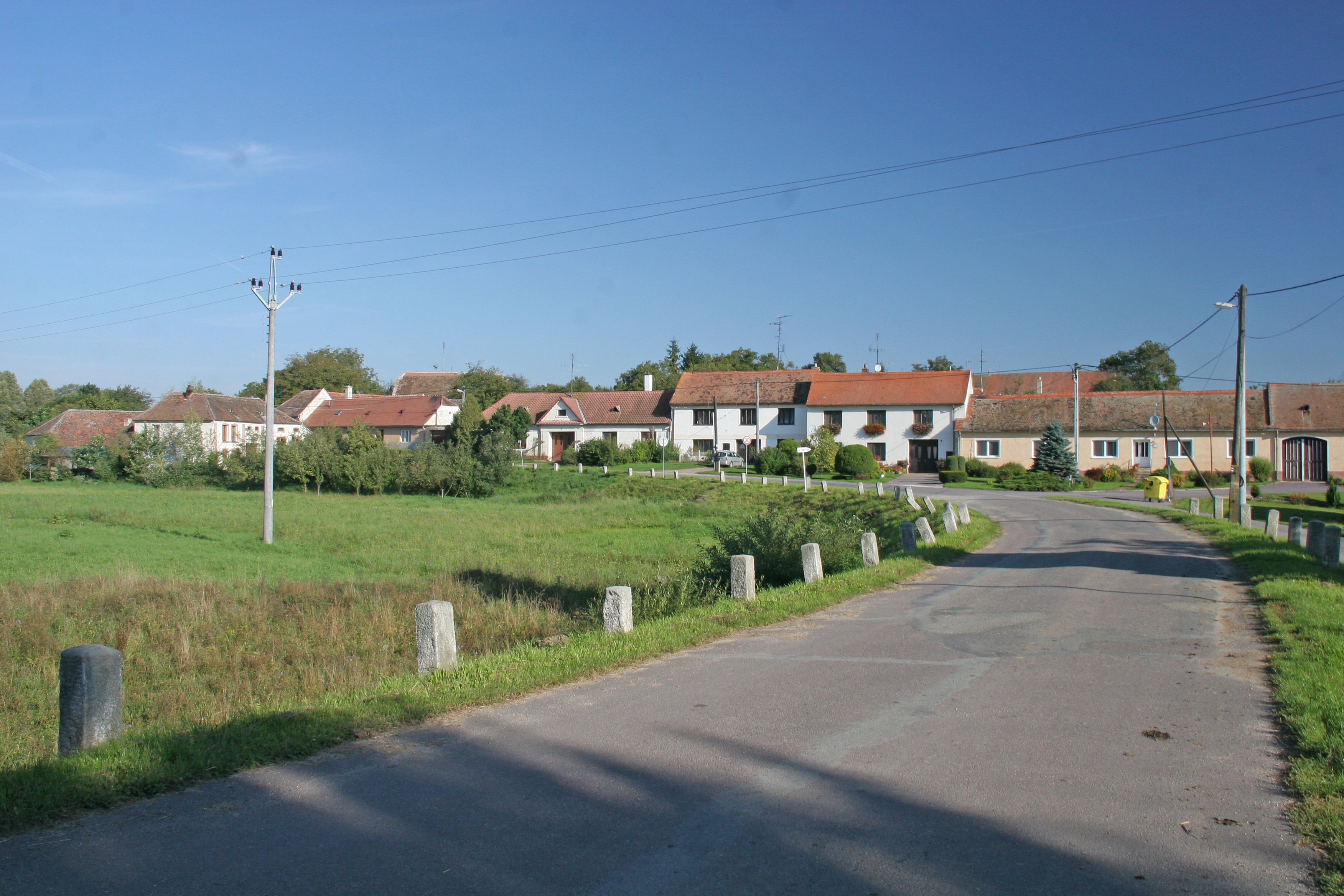 Bezkov náves